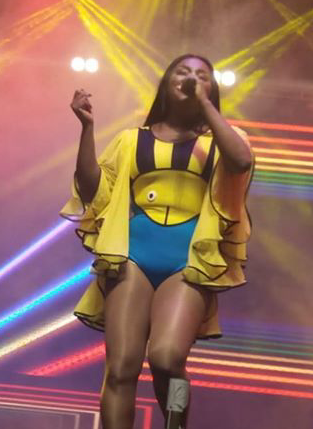 Karin na turnê do Rouge, em 2018.